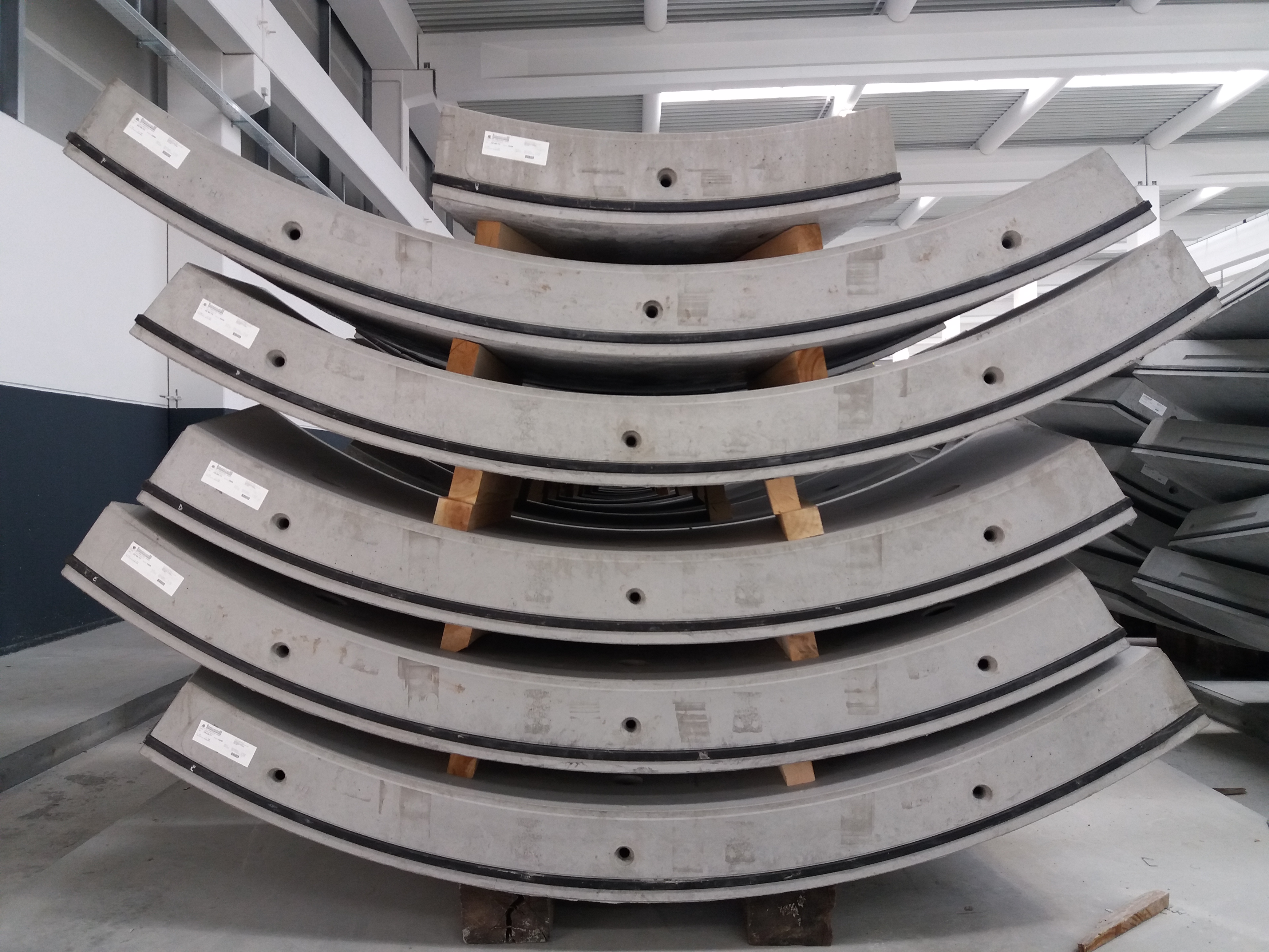 concio in calcestruzzo